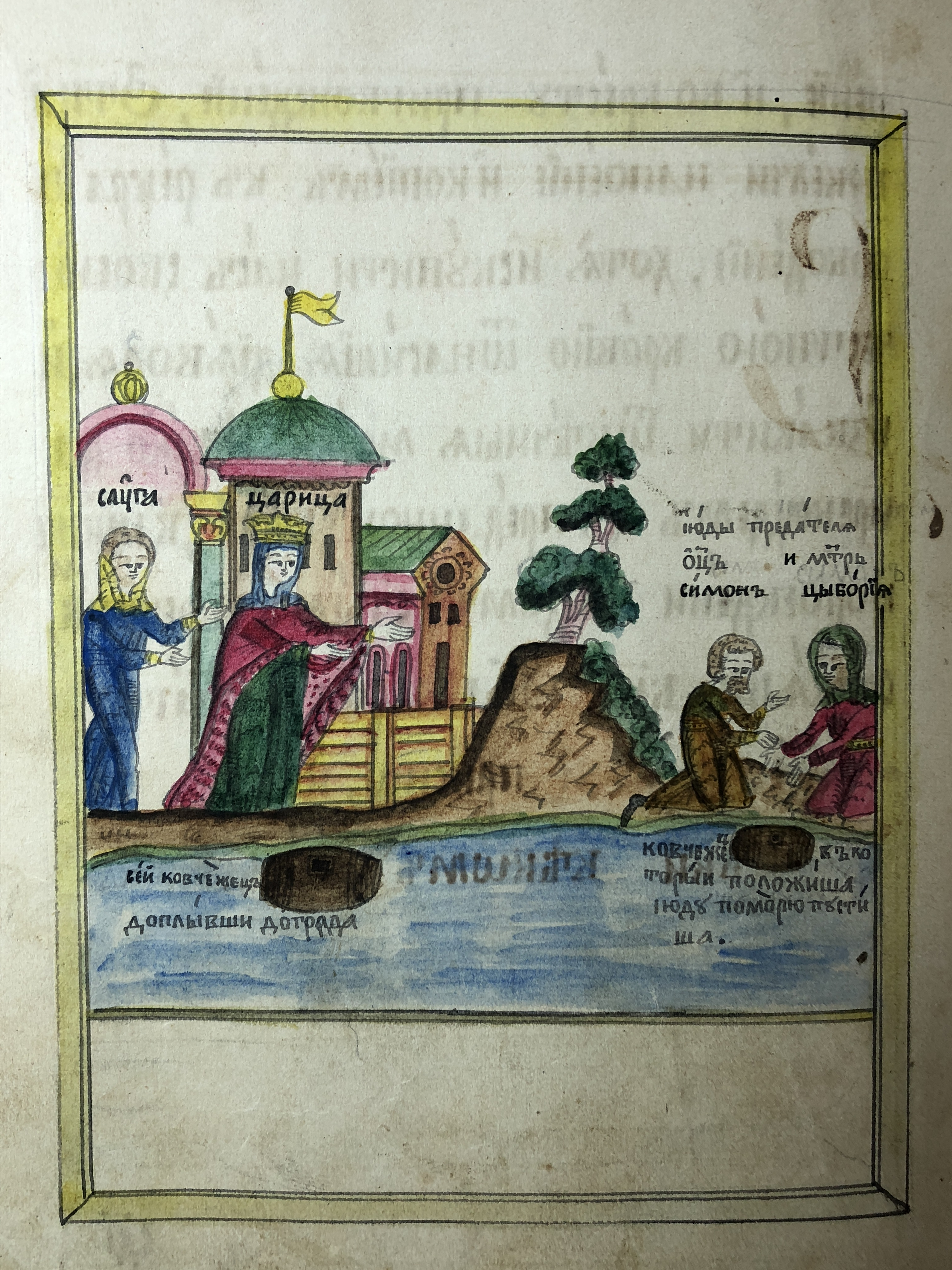 История рождения Иуды Искариота по Сказания Иеронима об Иуде-предателе (миниатюра рукописных Страстей Христовых, 1860-е гг.; частное собрание)